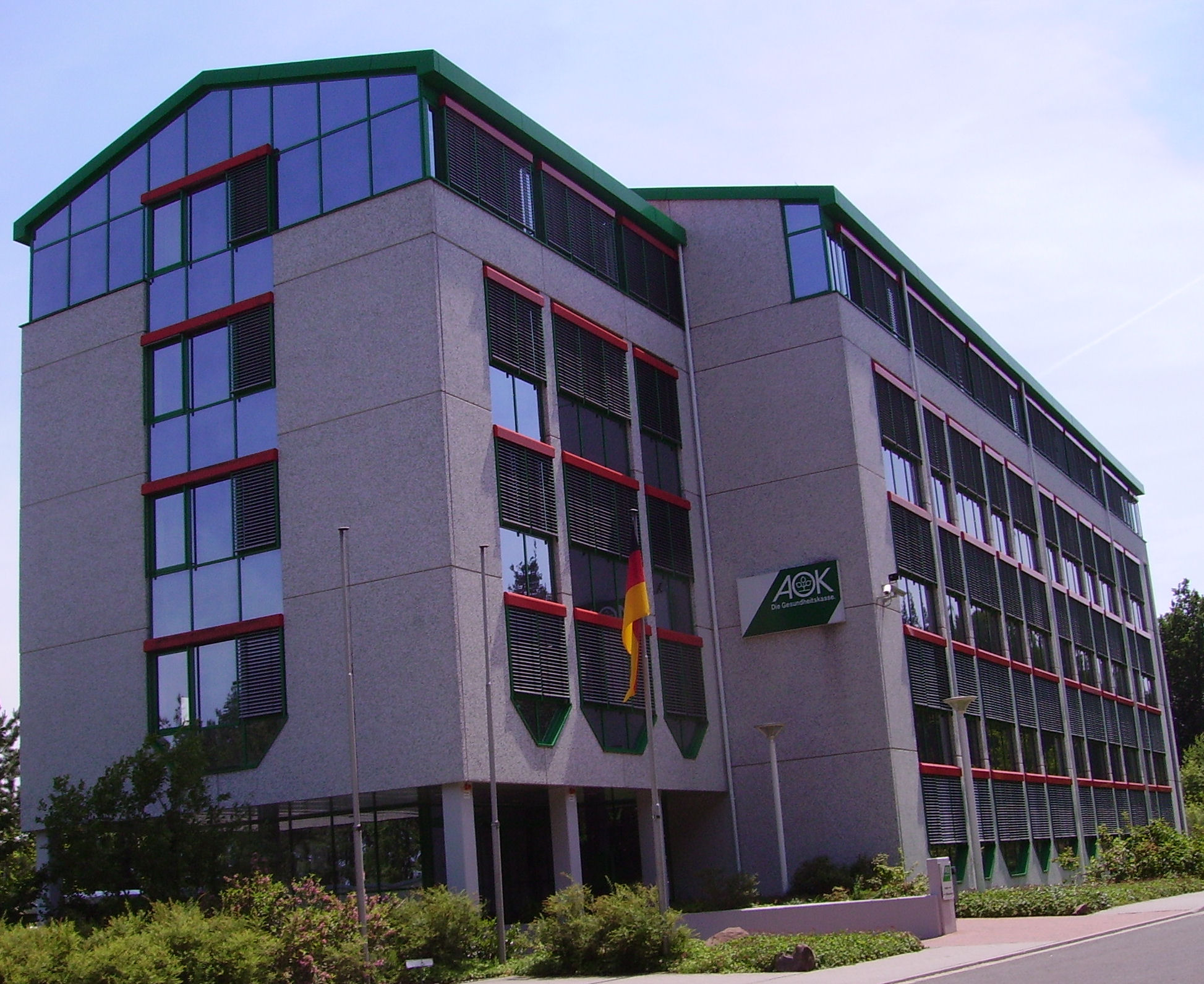 sights of Eisenberg, Germany